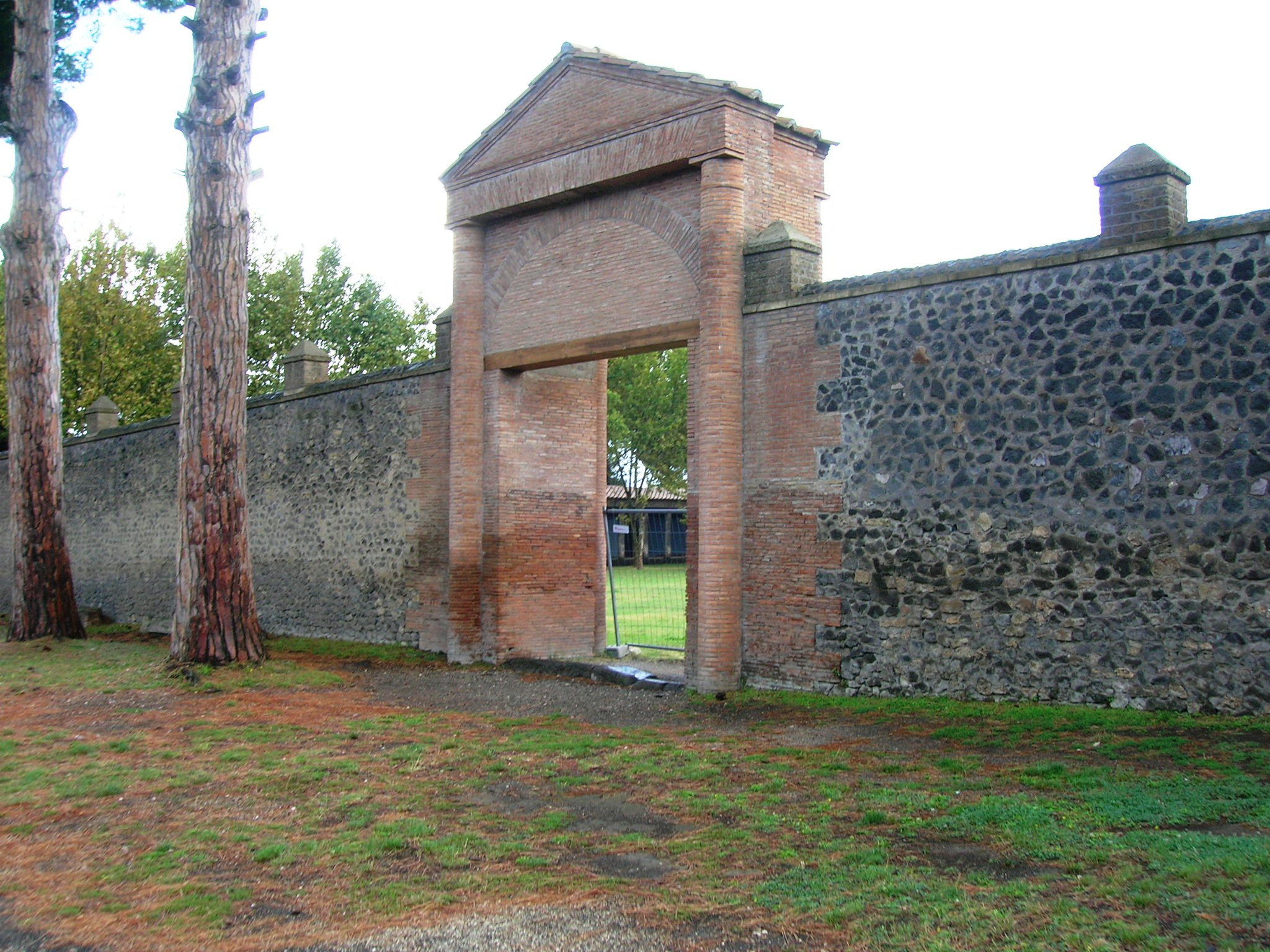 Ingresso della palestra - MIBACT This is a photo of a monument which is part of cultural heritage of Italy.